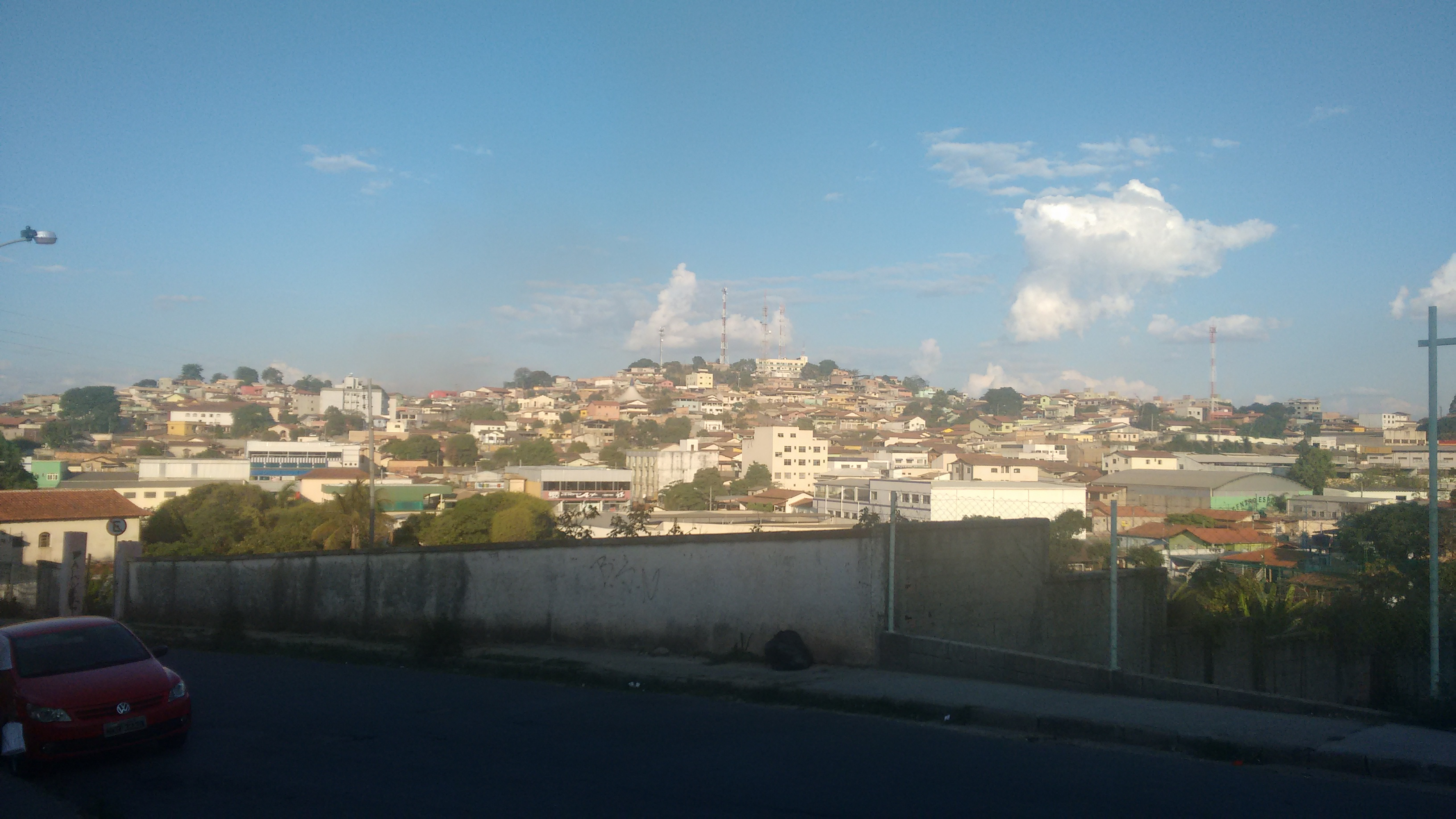 Região do centro de Ribeirão das neves - Vista para os bairros São Geraldo e Santa Matilde